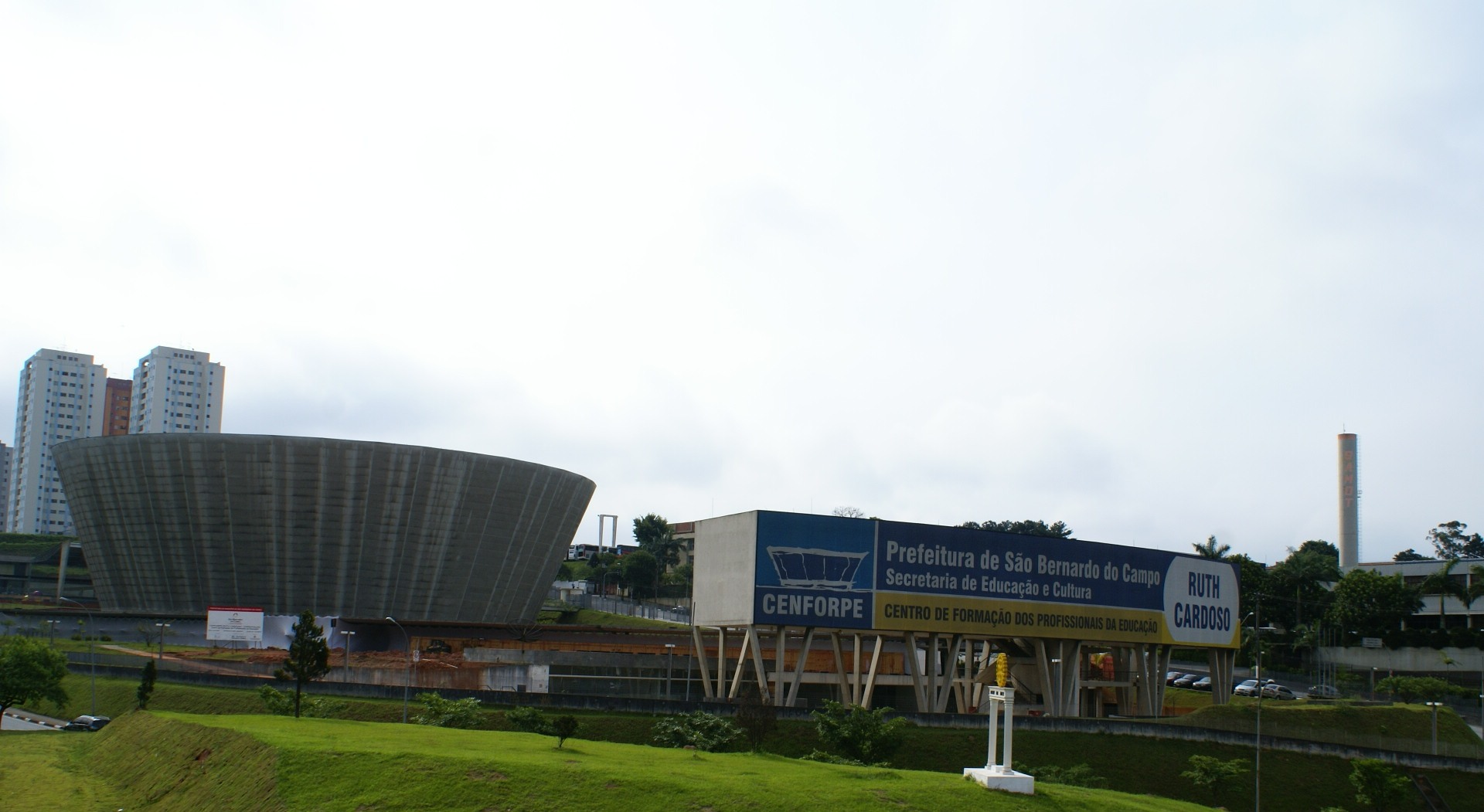 Centro de Formação dos Profissionais da Educação de São Bernardo do Campo, Brasil